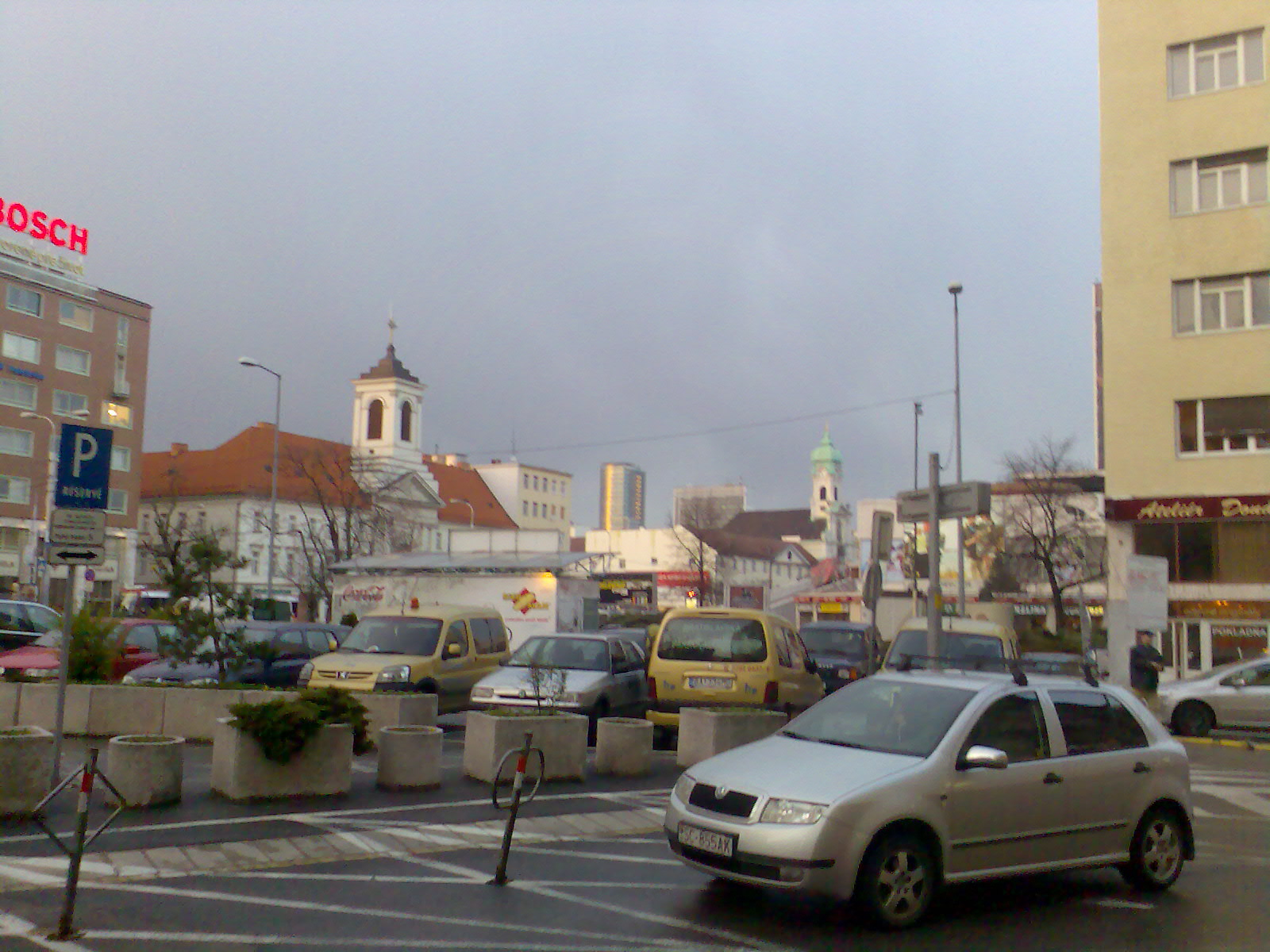 Medzi najznámejšie miesta, kde je možné zakúpiť Richman, patrí bratislavské Kamenné námestie.